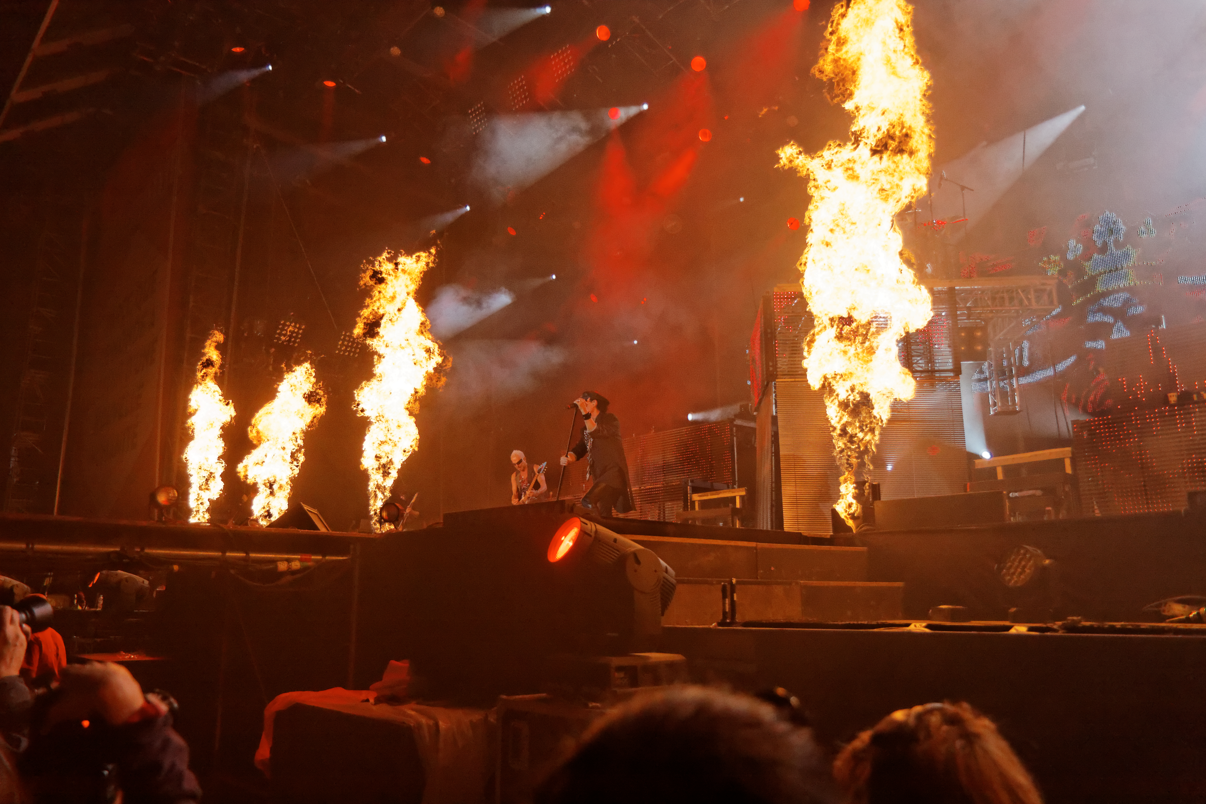 Scorpions en concert sur la grande scène lors de la fête de l'Humanité 2014.